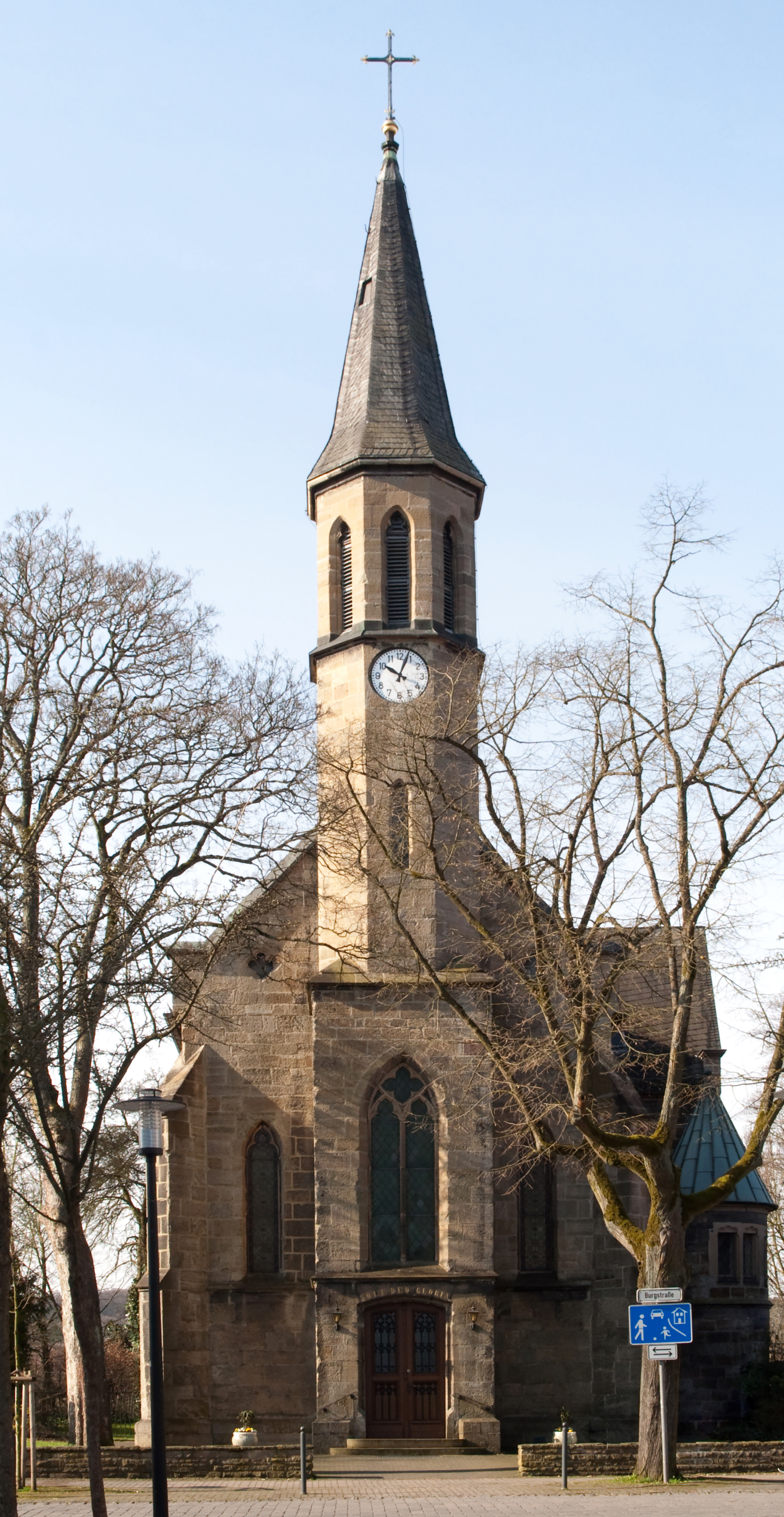 evangelische Kirche, Neheim, Burgstraße